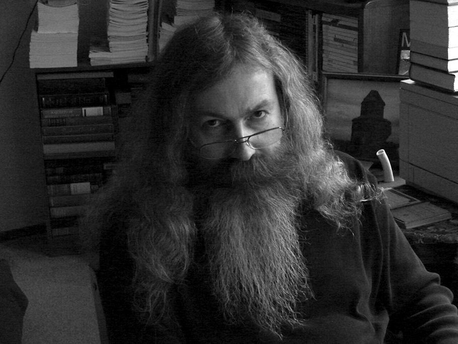 William Michaelian